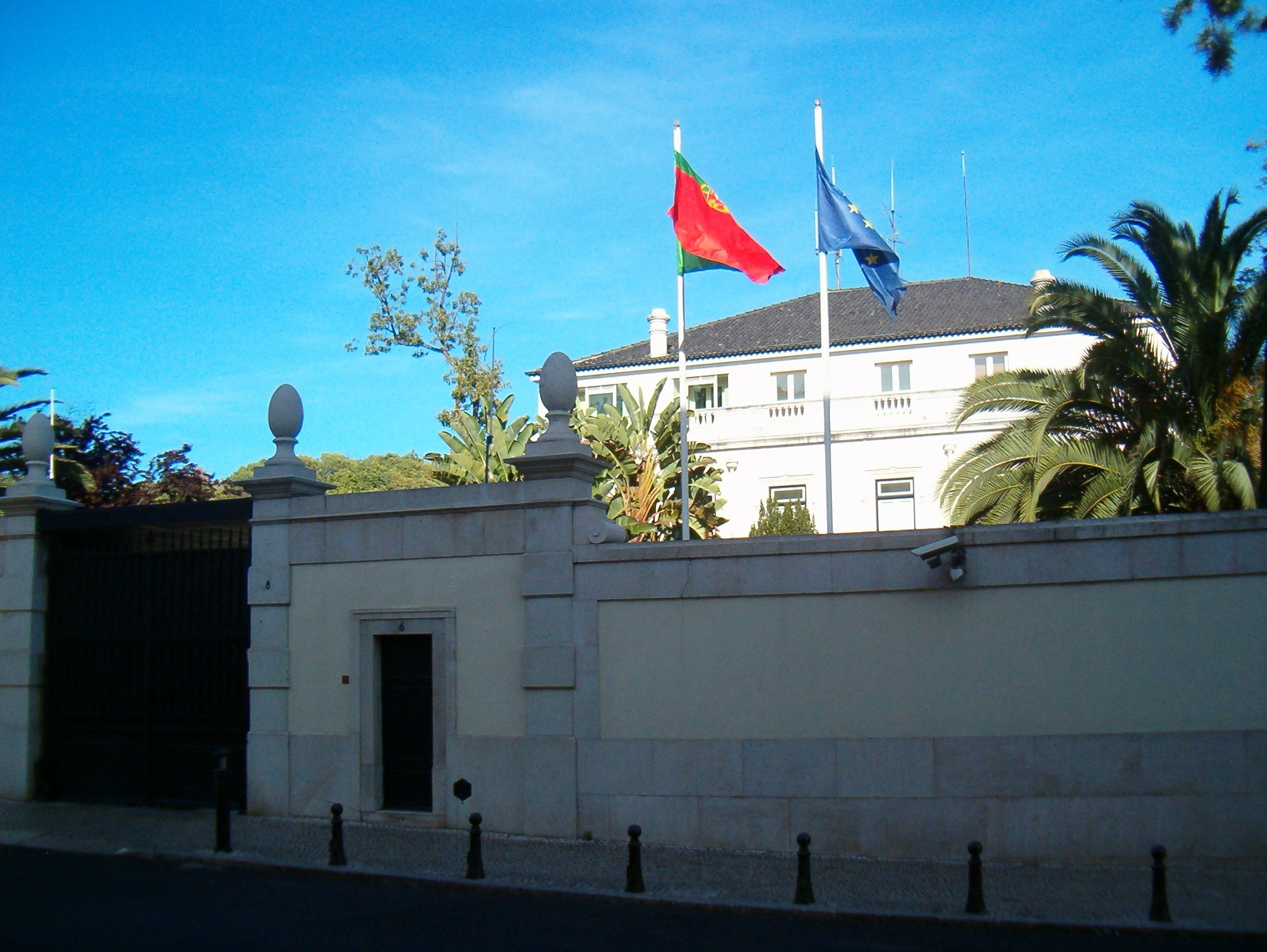 Residência Oficial do Primeiro-Ministro de Portugal, Palacete de São Bento